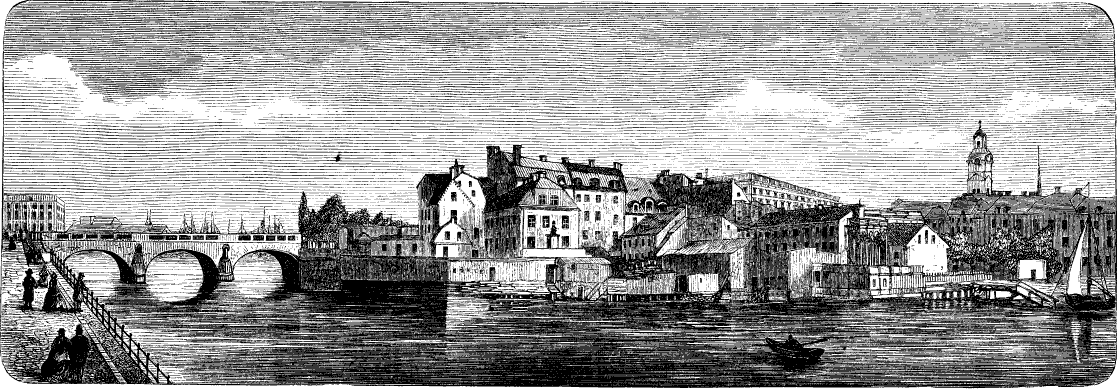 Vy över Helgeandsholmen, 1867. Bild från Svenska Familj-Journalen.